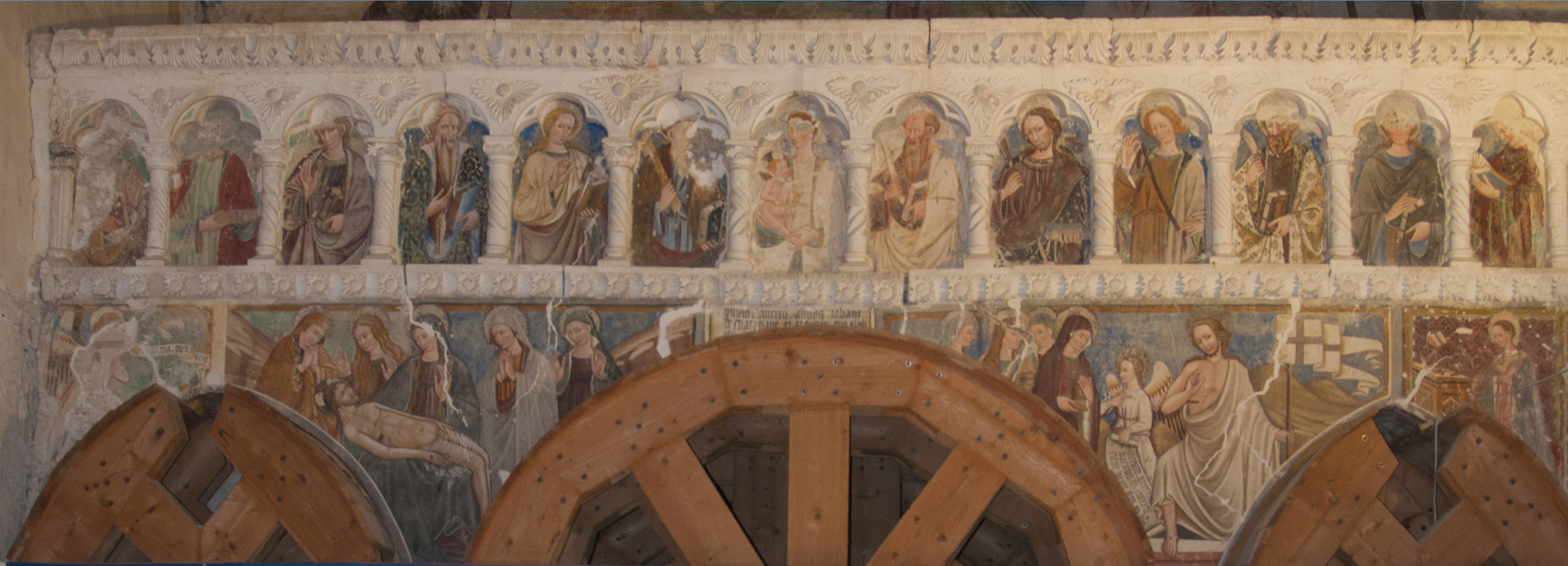 Chiesa di San Salvatore Campi